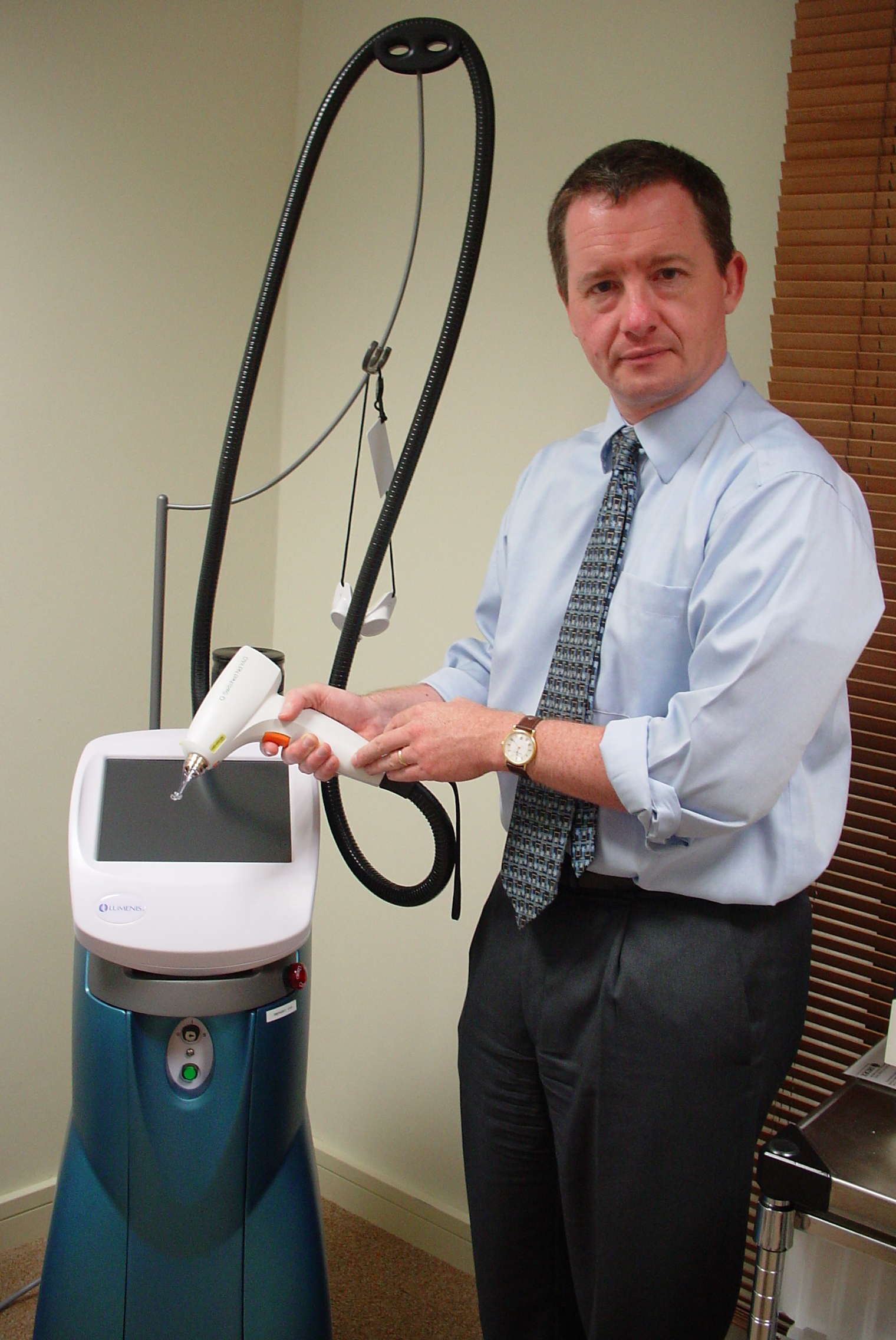 Láser dermatológico. Dermatological laser. Photo by Dr Peter Crouch.